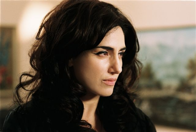 רונית אלקבץ בסרטה של קרן ידעיה "כלת הים", 2009